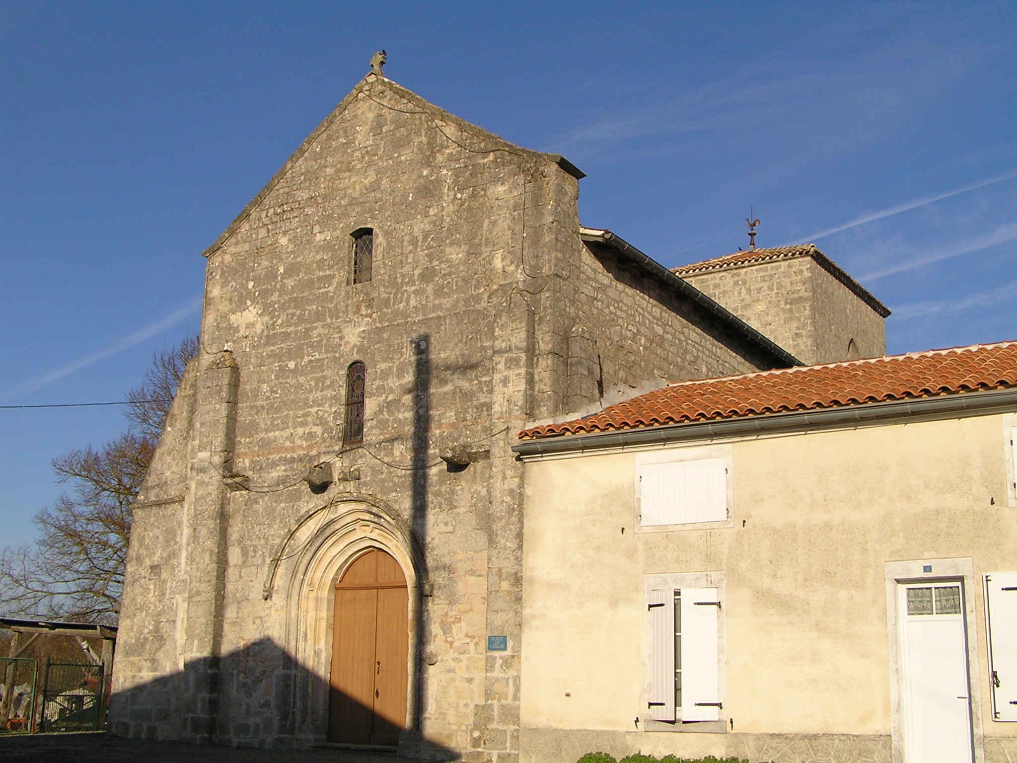 église de Mons